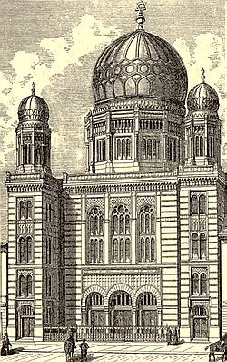 Berlin Neue Synagoge Außenansicht Farbe